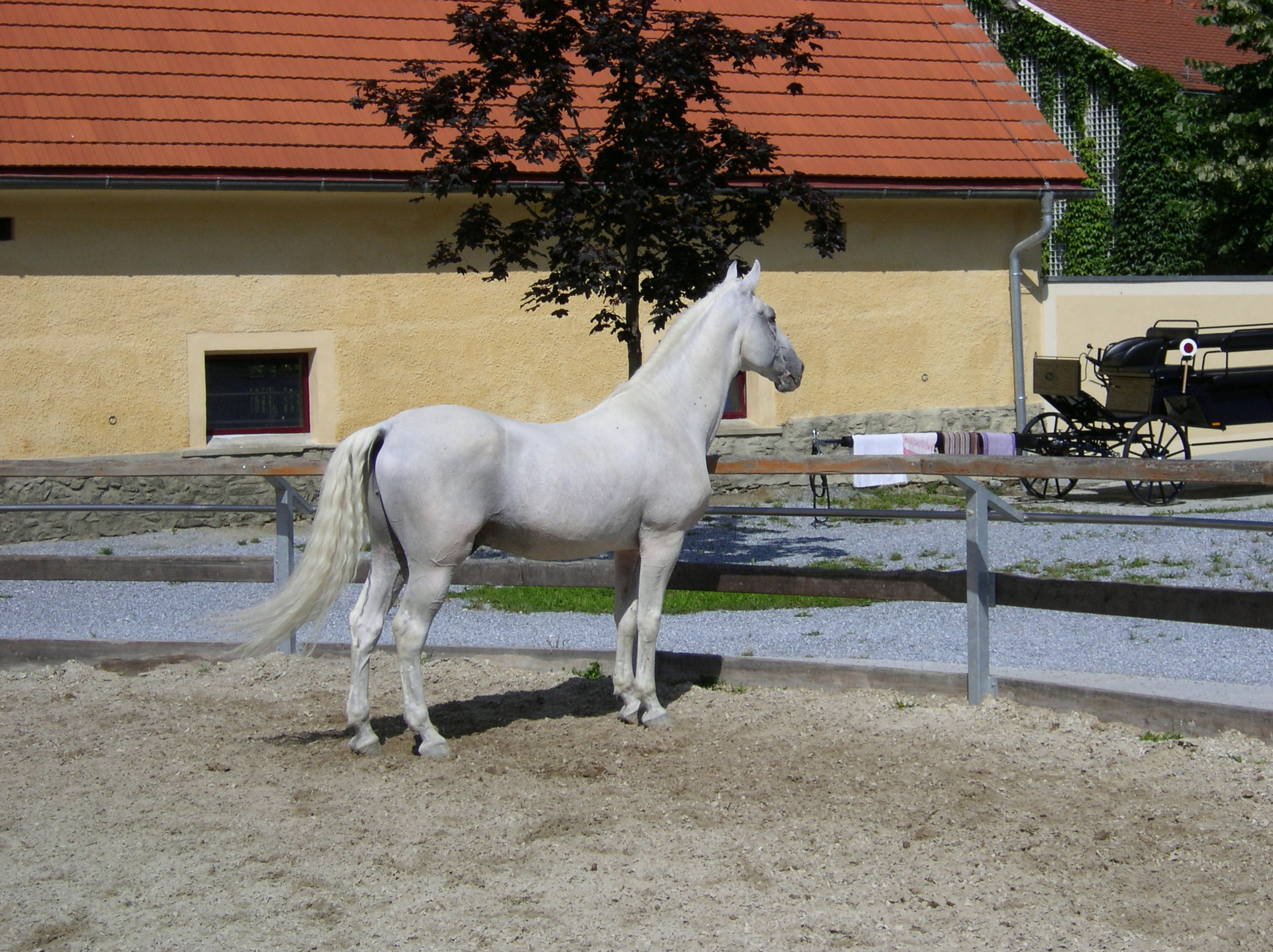 Alter Lipizzaner auf Gestüt Piber